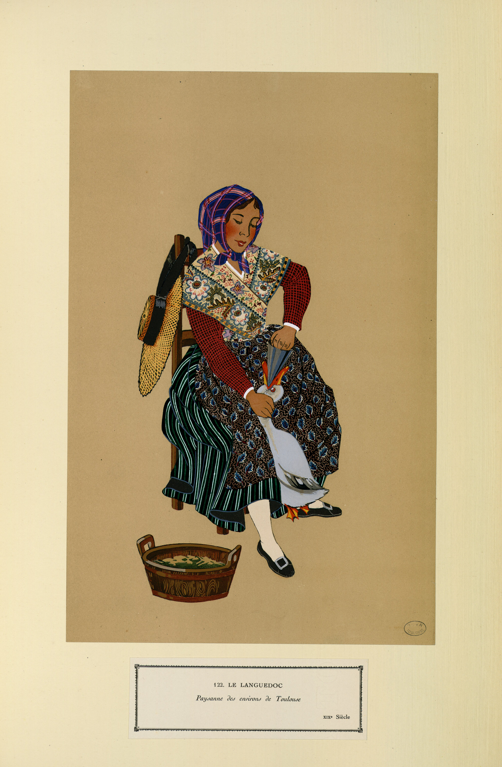 Fac-similé des deux-cents gouaches en couleur exposées en Janvier 1928 chez Bernheim jeune à Paris. Les originaux édités vont alors au Métropolitain Museum de New-York. La série comporte 25 fascicules de 240 francs pièce. Les 27 planches rassemblées ici sont les suivantes: pl. 34, 35, 36, 37, 38, 39, 40, 86, 87, 88, 89, 90, 91, 106, 107, 108, 109, 110, 111, 112, 113, 114, 115, 122, 123, 124, 125. Pièces jointes : prospectus du fac-similé des deux-cents gouaches en couleur exposées en Janvier 1928 chez Bernheim-jeune (galerie) à Paris et catalogue de cette exposition de 1928. Ancely, René (1876 - 1966). Possesseur